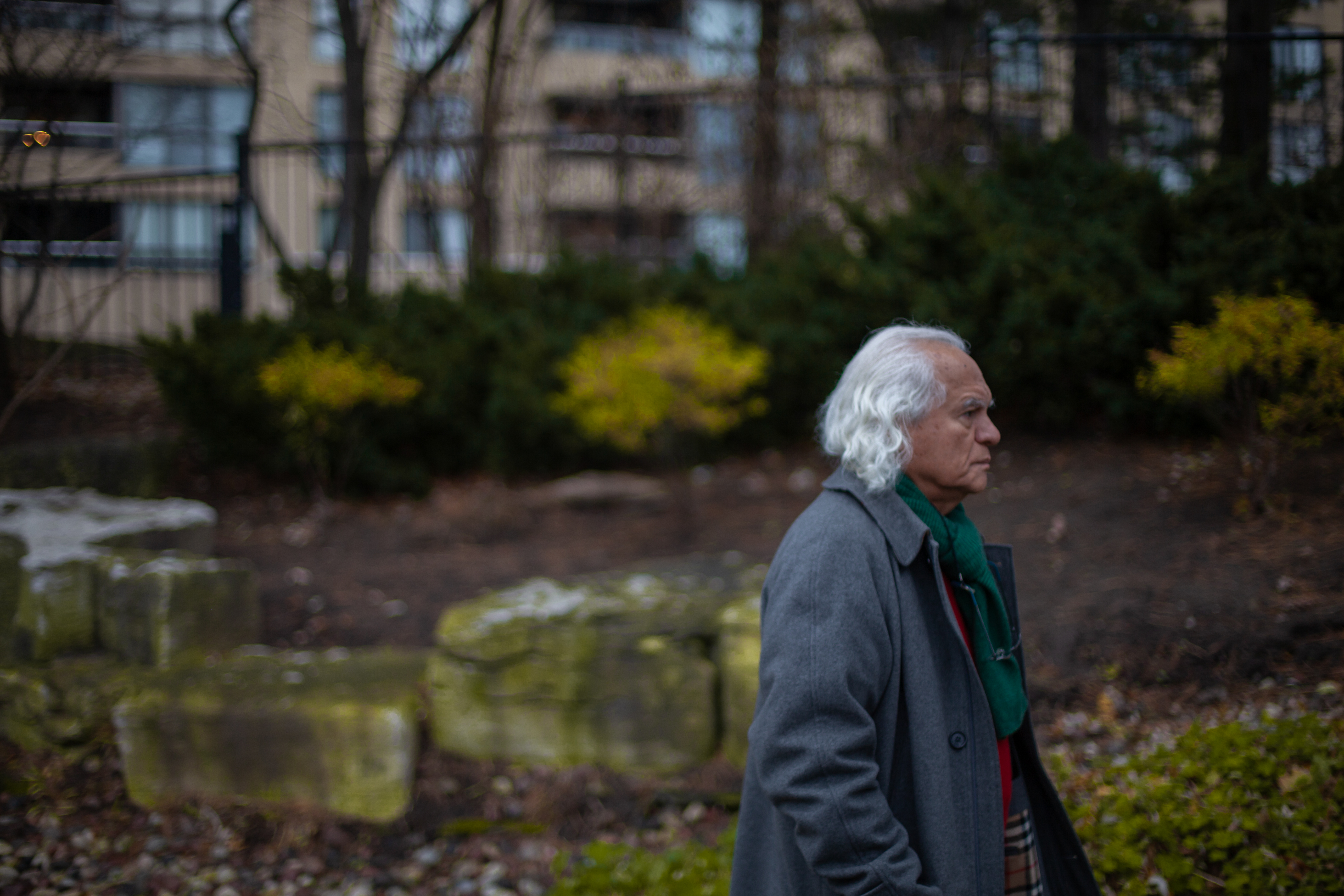 این عکس ها در شهر تورنتو توسط پوریا افخمی ثبت شده است.